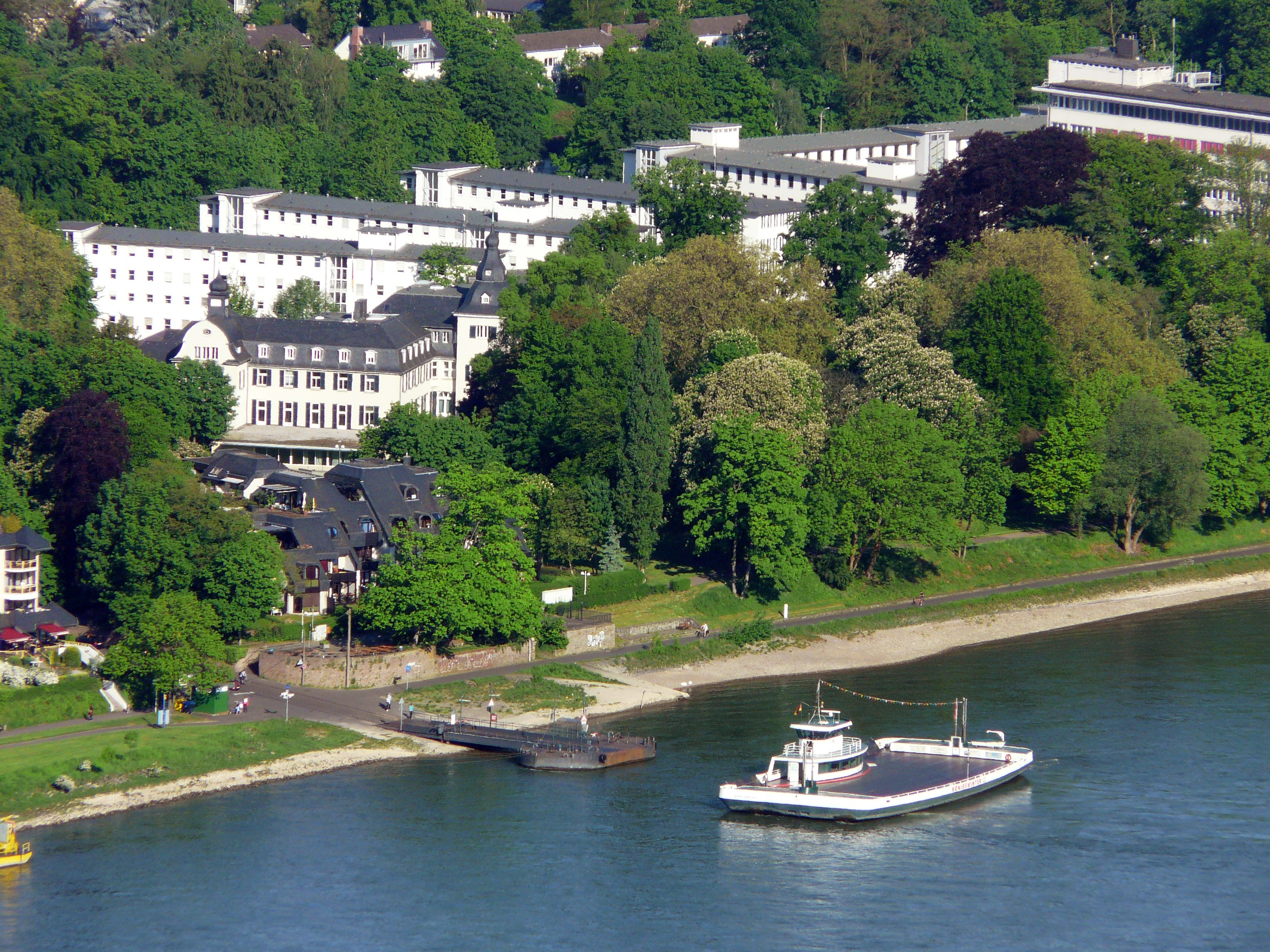 Dienstsitz des Bundesamts für Bauwesen und Raumordnung (BBR) und der Bundesanstalt für Landwirtschaft und Ernährung (BLE) in der Deichmannsaue in Bonn-Rüngsdorf; auf dem Rhein die Fähre Bad Godesberg–Königswinter